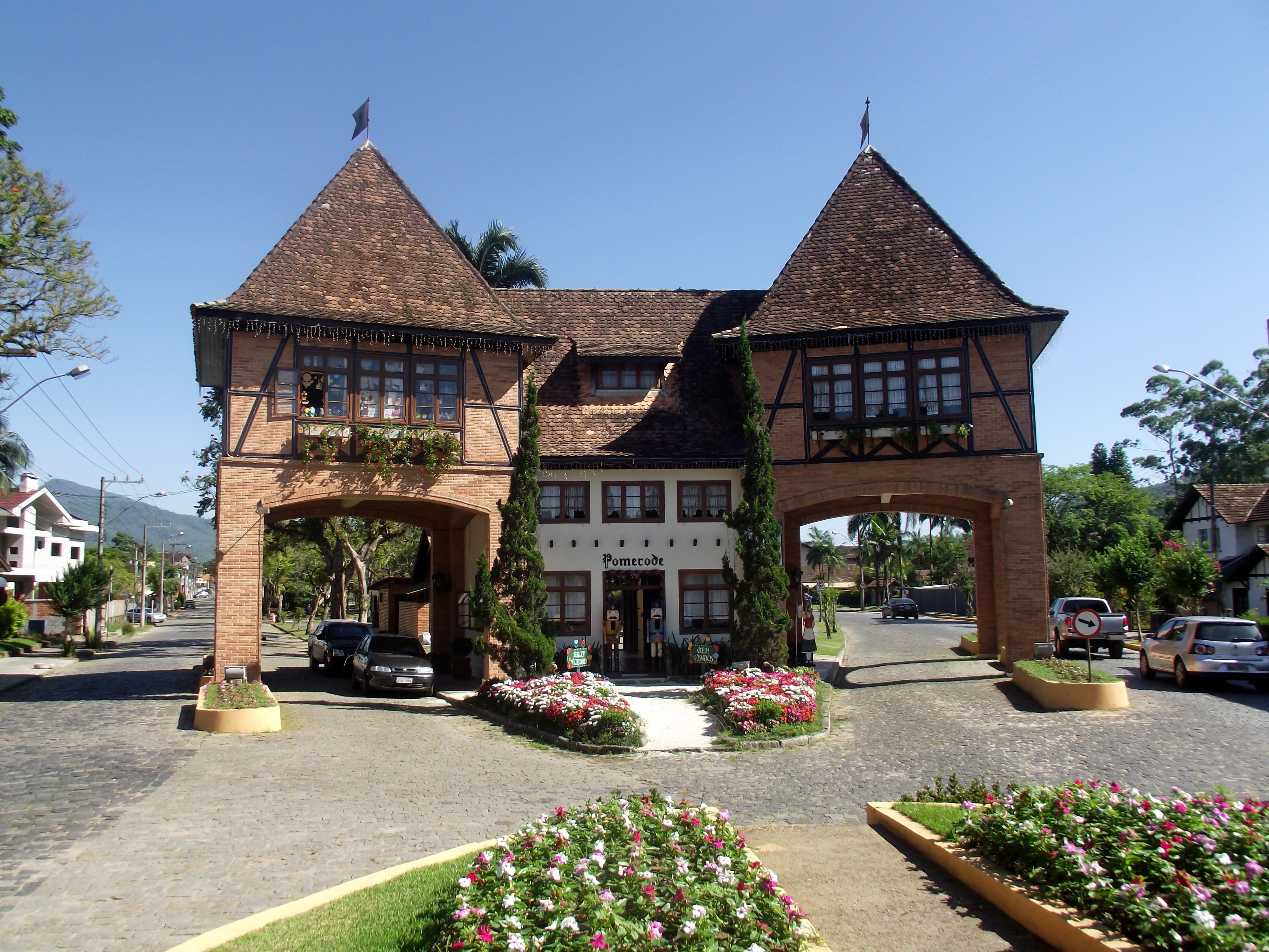 Portal de Pomerode, Santa Catarina